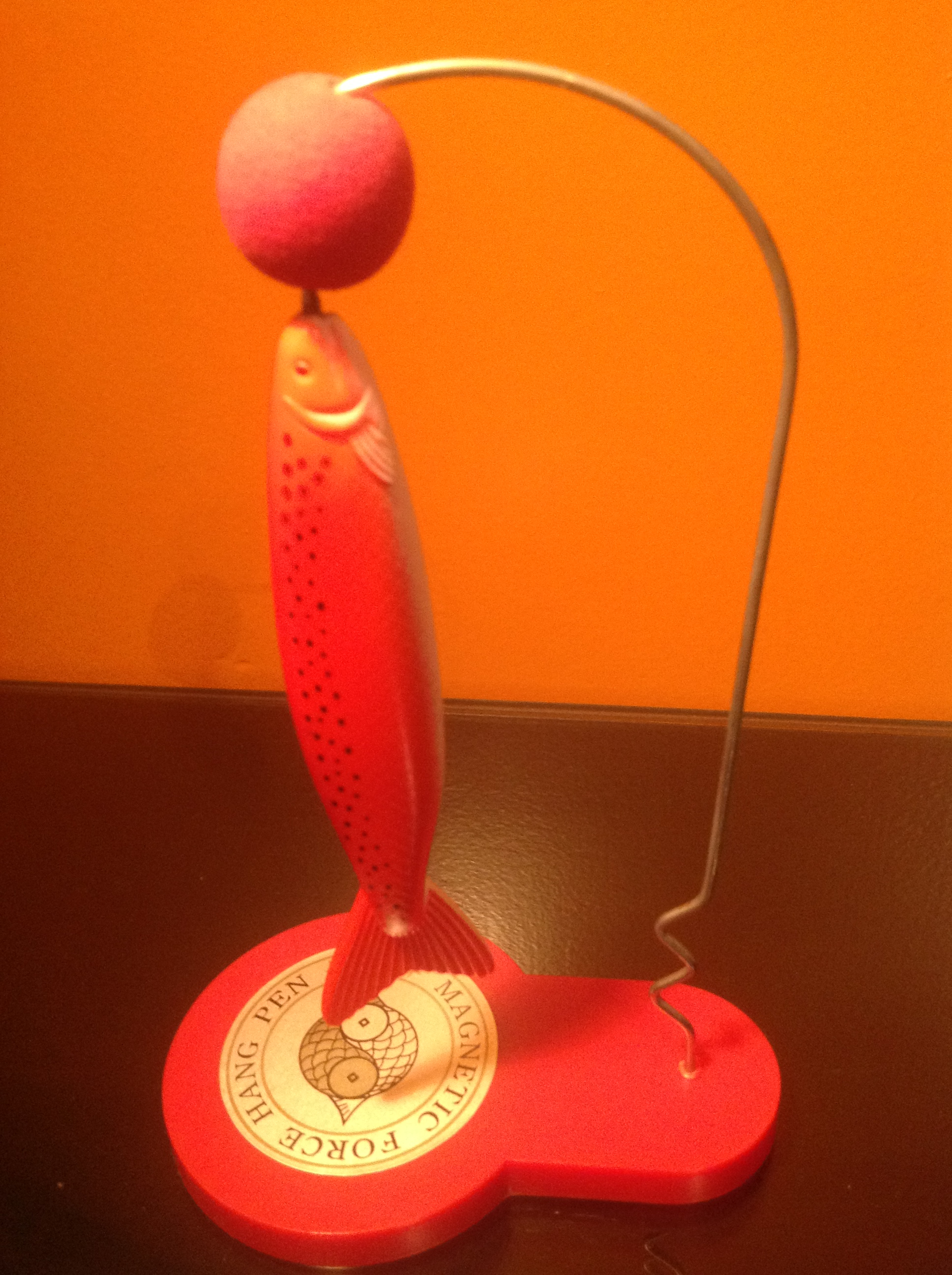 Bolígrafo imantado